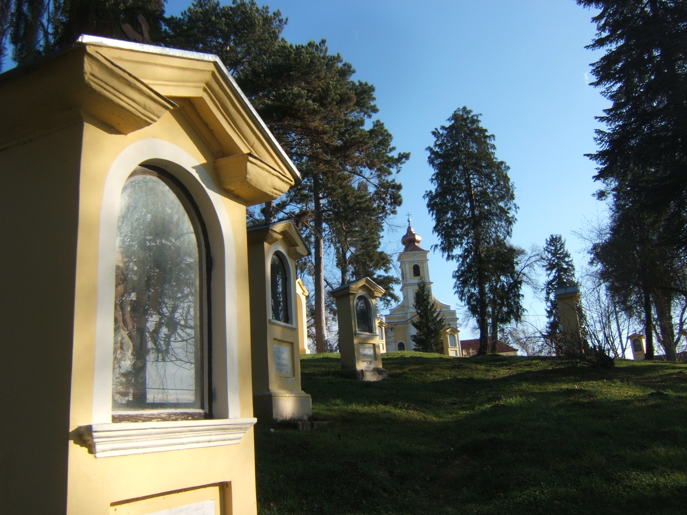 Somogyvár, kálvária a templomnál